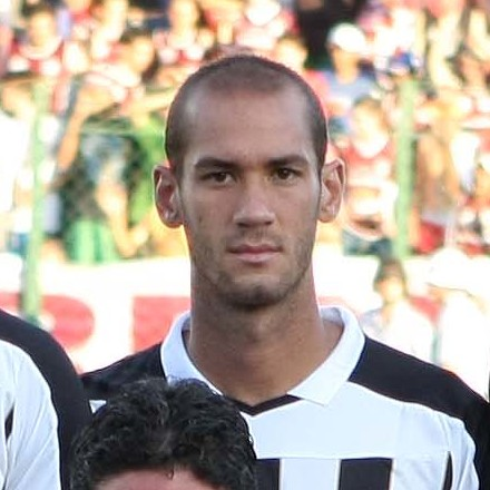 CAMPEONATO PAULISTA 2008 FUTEBOL ESPORTES SETÃOZINHO X SANTOS Time do Santos que iniciou a partida. - ESTÁDIO FREDERICO DALMAZO SERTÃOZINHO/SP BRASIL 01/03/2008 Foto: Junior Faria/GazetaPress código da foto